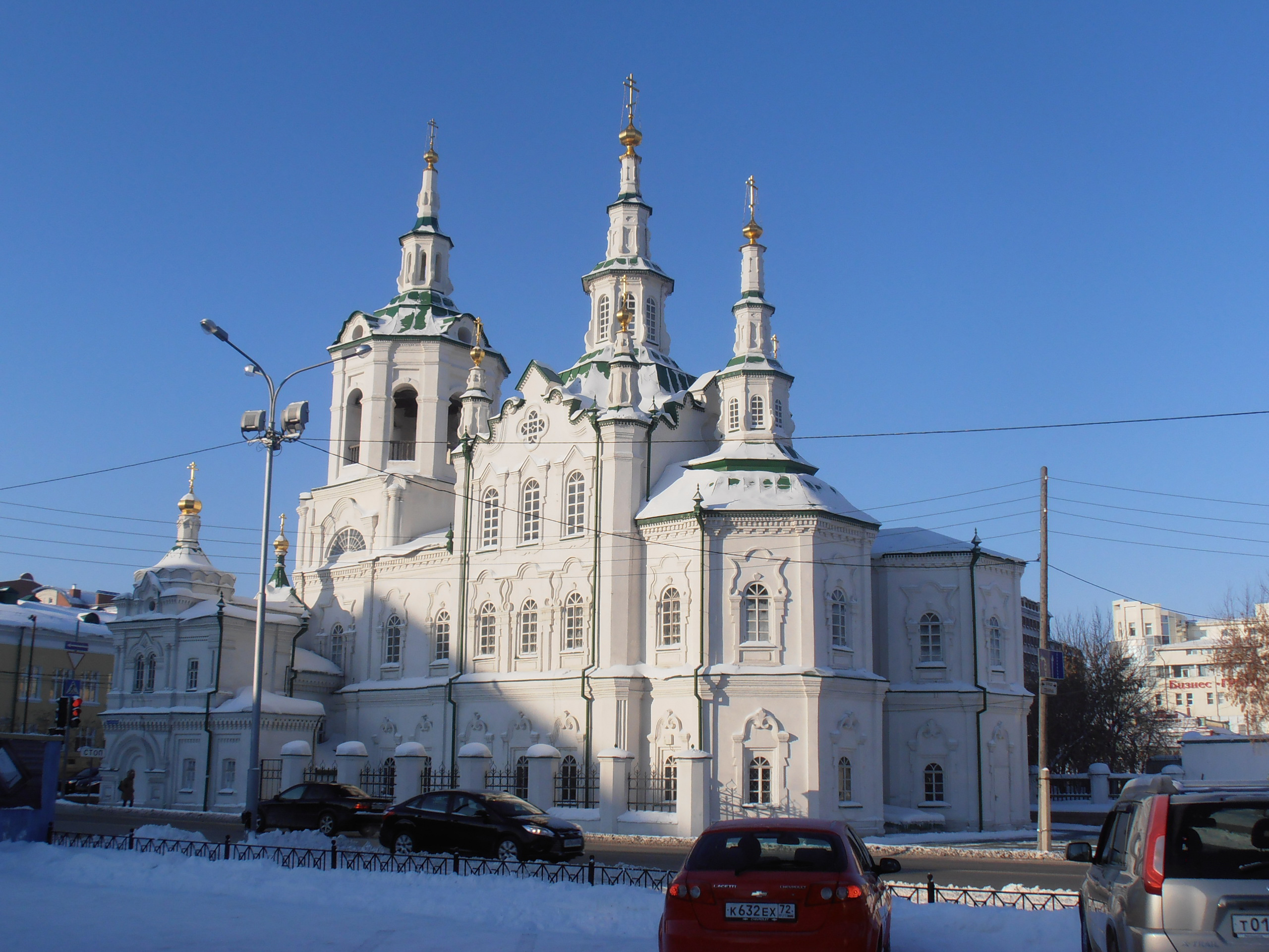 Вид на Спасскую церковь в Тюмени со стороны филармонии (ул. Челюскинцев). Великолепно видно, как пристрой по проекту Б. Б. Цинге выходит за красную линию.